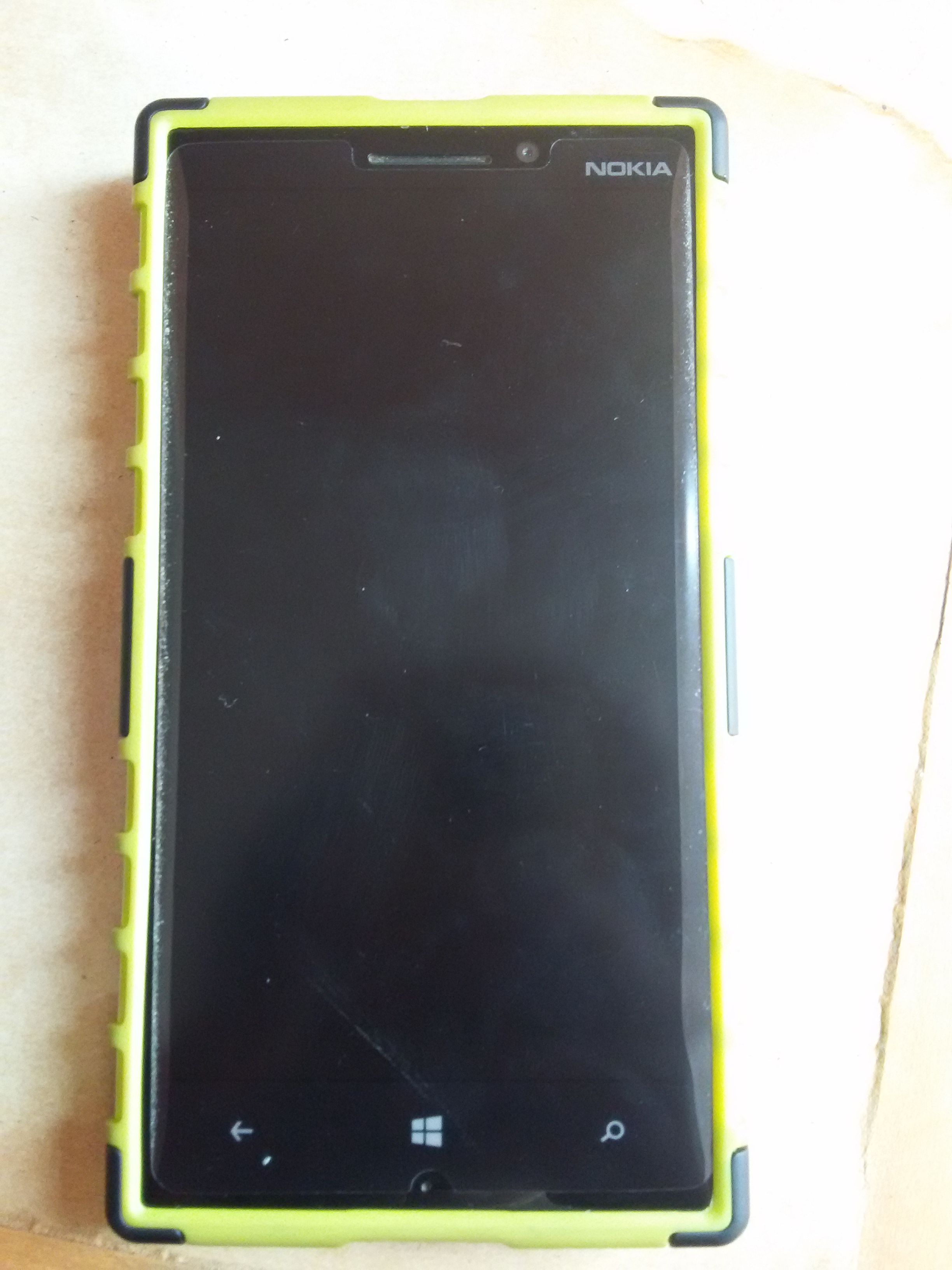 Un Nokia lumia 930 con protector verde